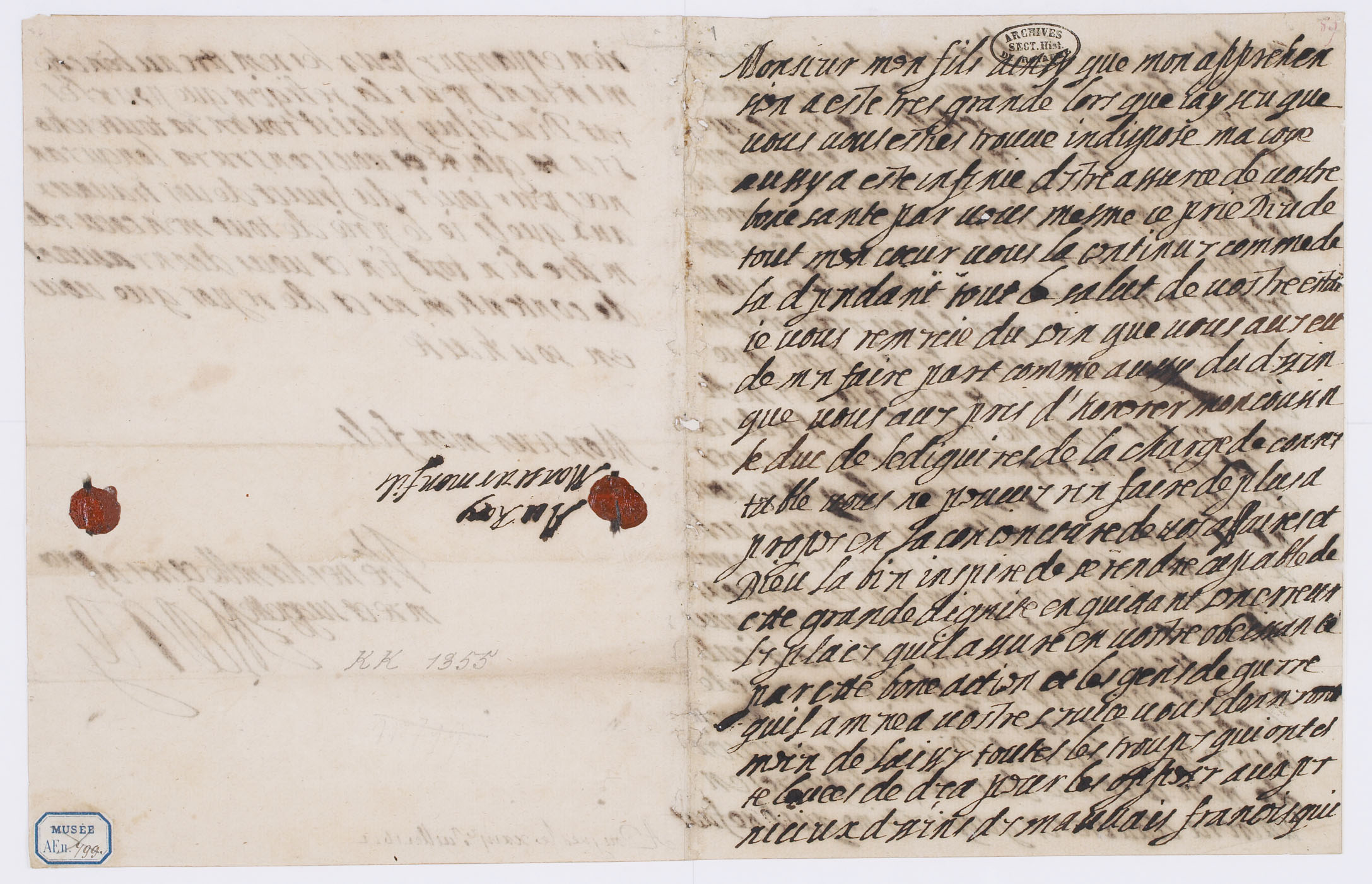 Lettre autographe de Marie de Médicis, écrite à Pougues le 23 juillet 1622 et adressée à Louis XIII, faisant allusion à la conversion au catholicisme du duc de Lesdiguières et sollicitant pour celui-ci la charge de connétable, première et dernière pages.